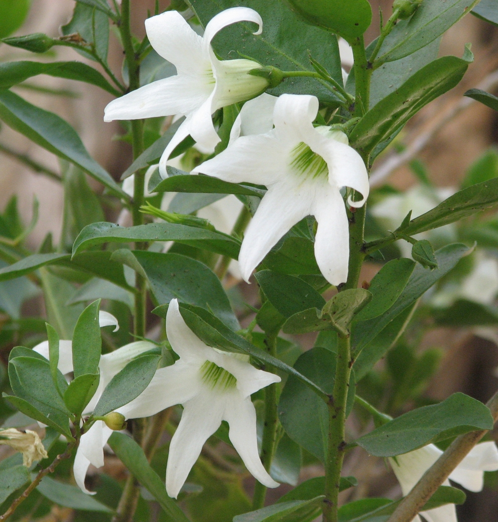 Anthocercis viscosa, Maranoa Gardens, Balwyn, Victoria, Australia